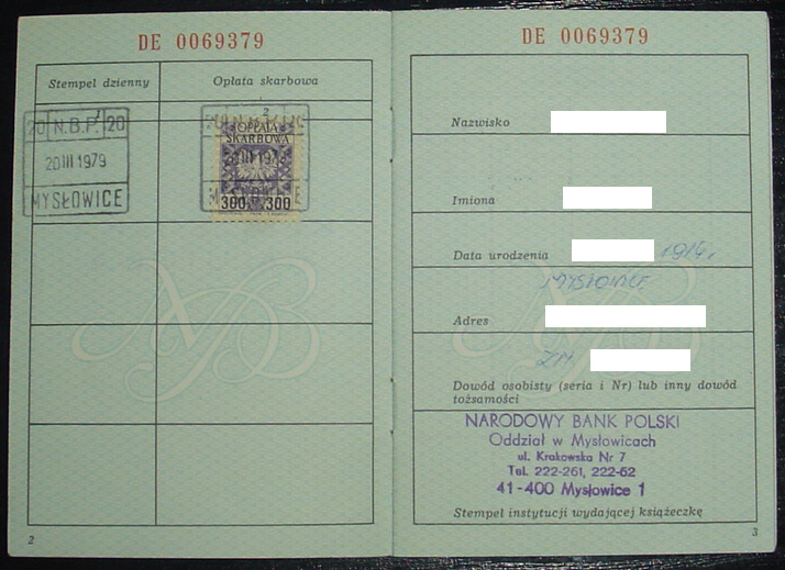 Książeczka walutowa z roku 1979, strony z danymi posiadacza (usunięte elektronicznie) i z opłatą skarbową za wydanie dokumentu (300 zł).